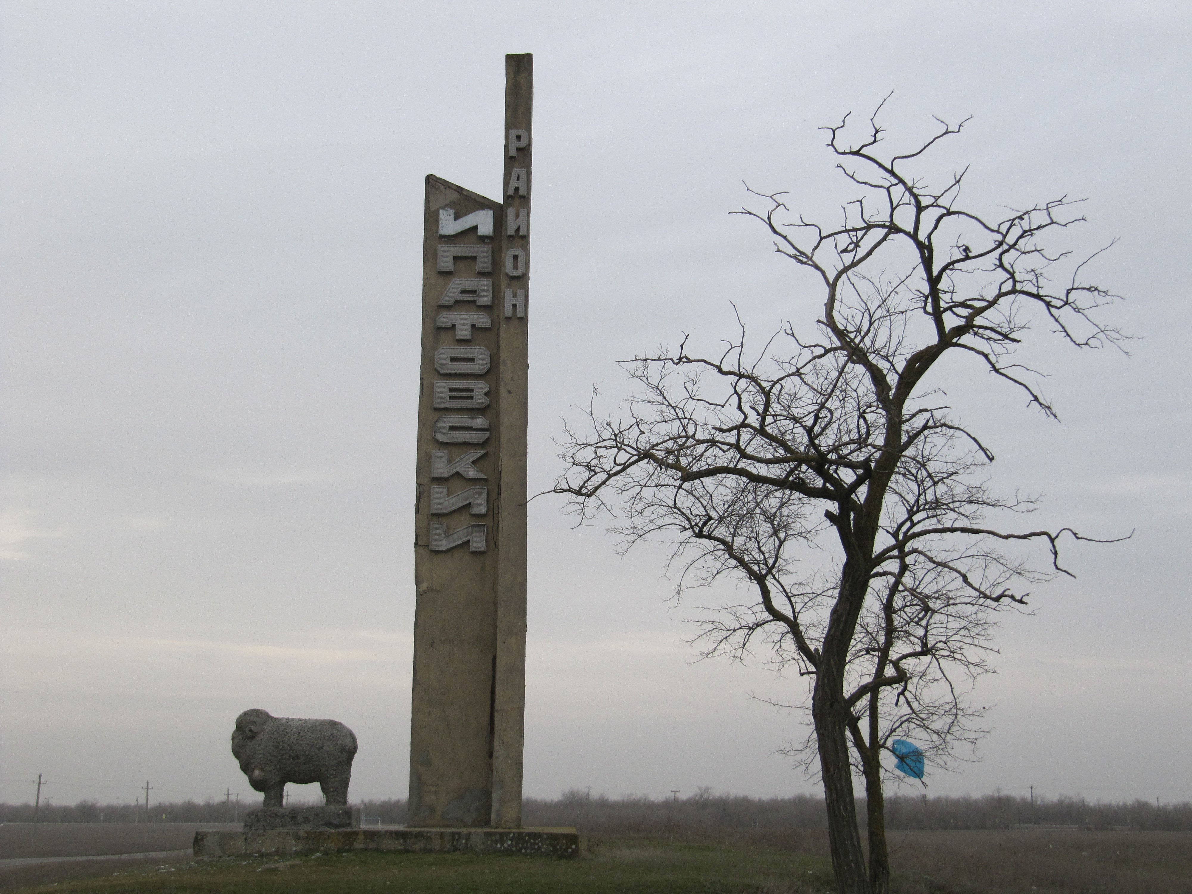 Дорожный указатель Ипатовского района